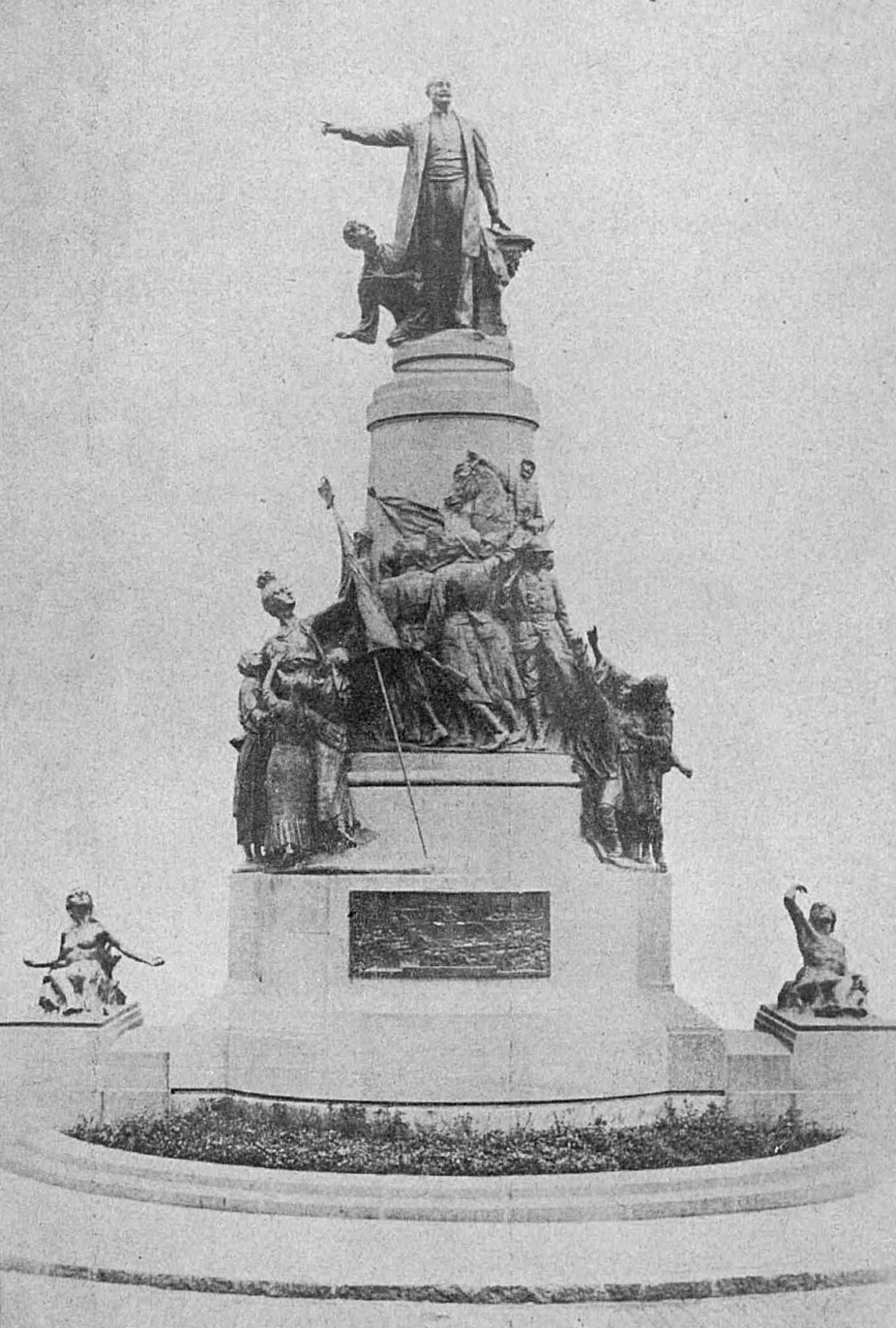 Monumentul lui Take Ionescu din Bucureşti, România. Pe un soclu cilindric înalt, Take Ionescu, reprodus în picioare, arată cu mâna dreaptă spre Ardeal. Mai jos, pe o platformă, doua nuduri uriaşe, răsturnate pe spate, simbolizeaza Nistrul şi Tisa.